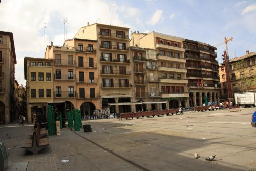 Lizarrako Foruen enparantza. Nafarroa, Euskal Herria.